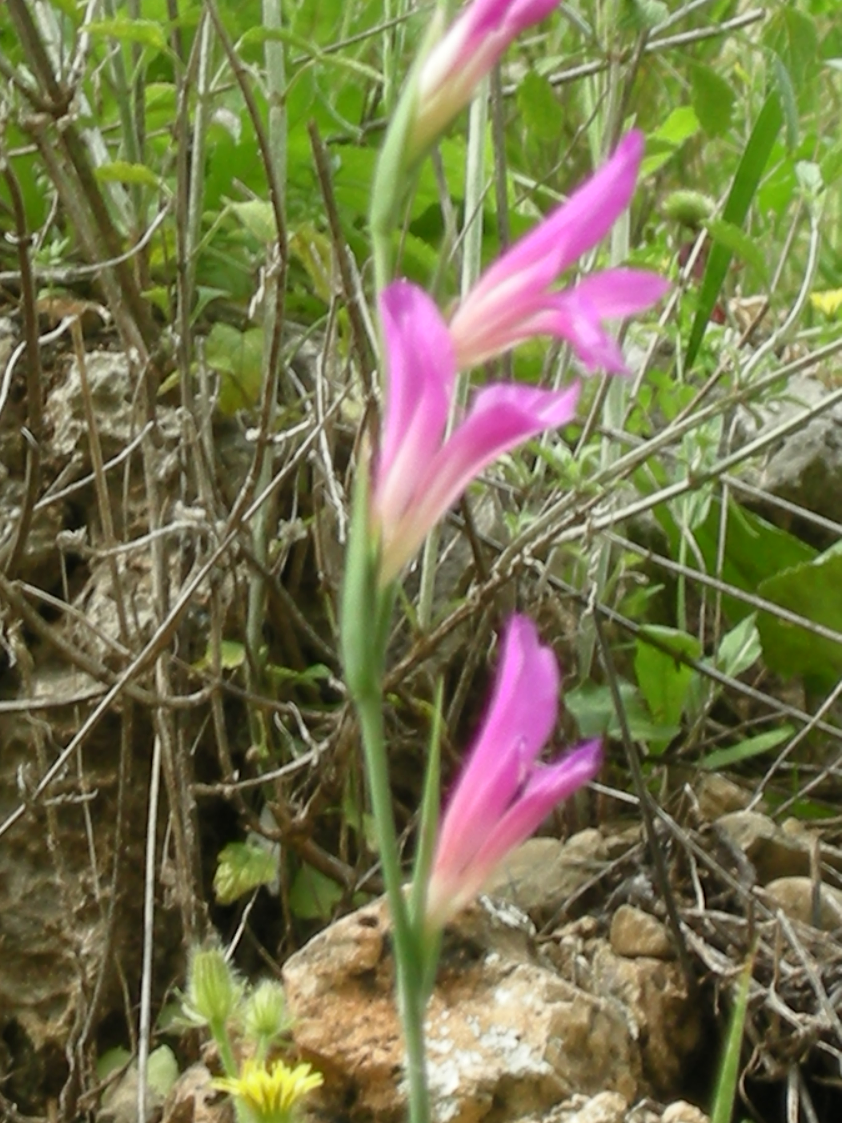 Bloom In Nahal Amud